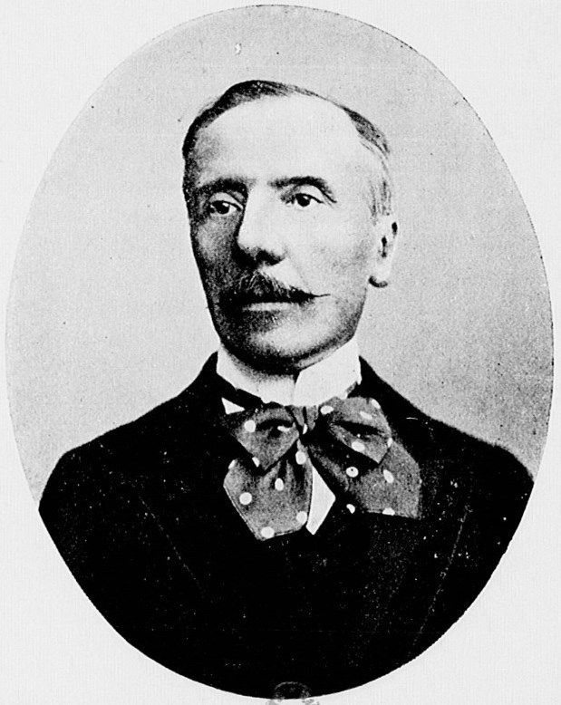 "M. le comte de Moüy, ancien ambassadeur de France à Rome".